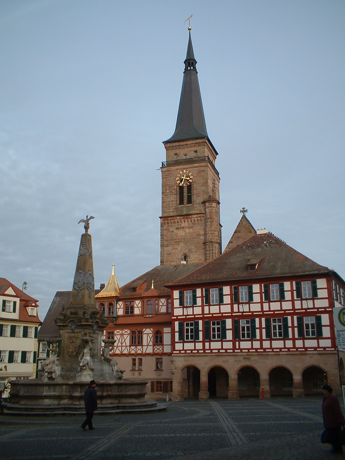 Schwabach, Rathaus und Stadtkirche am Marktplatz. Schwabach, Bayern, Deutschland.